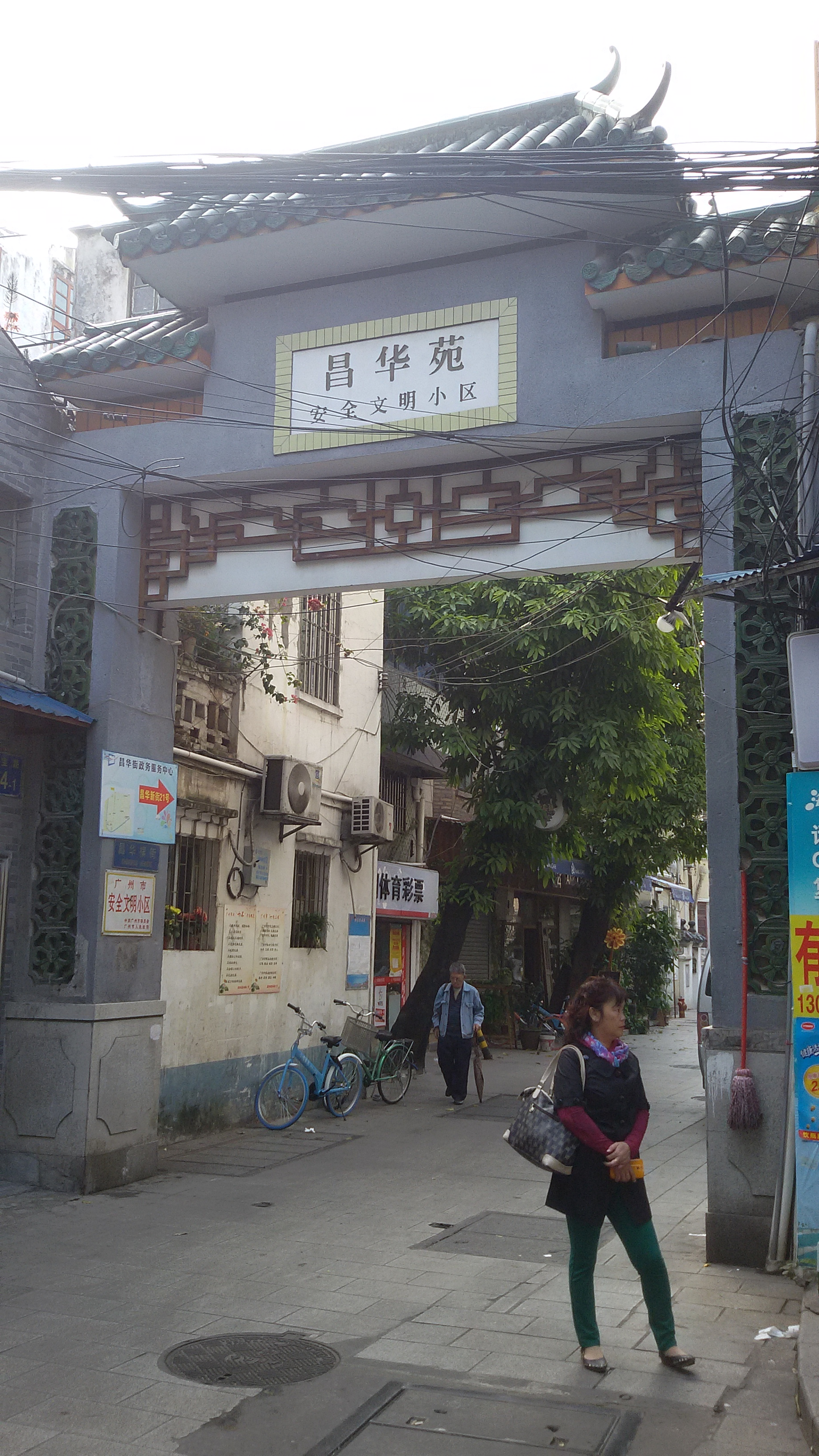 粵語: 昌華苑